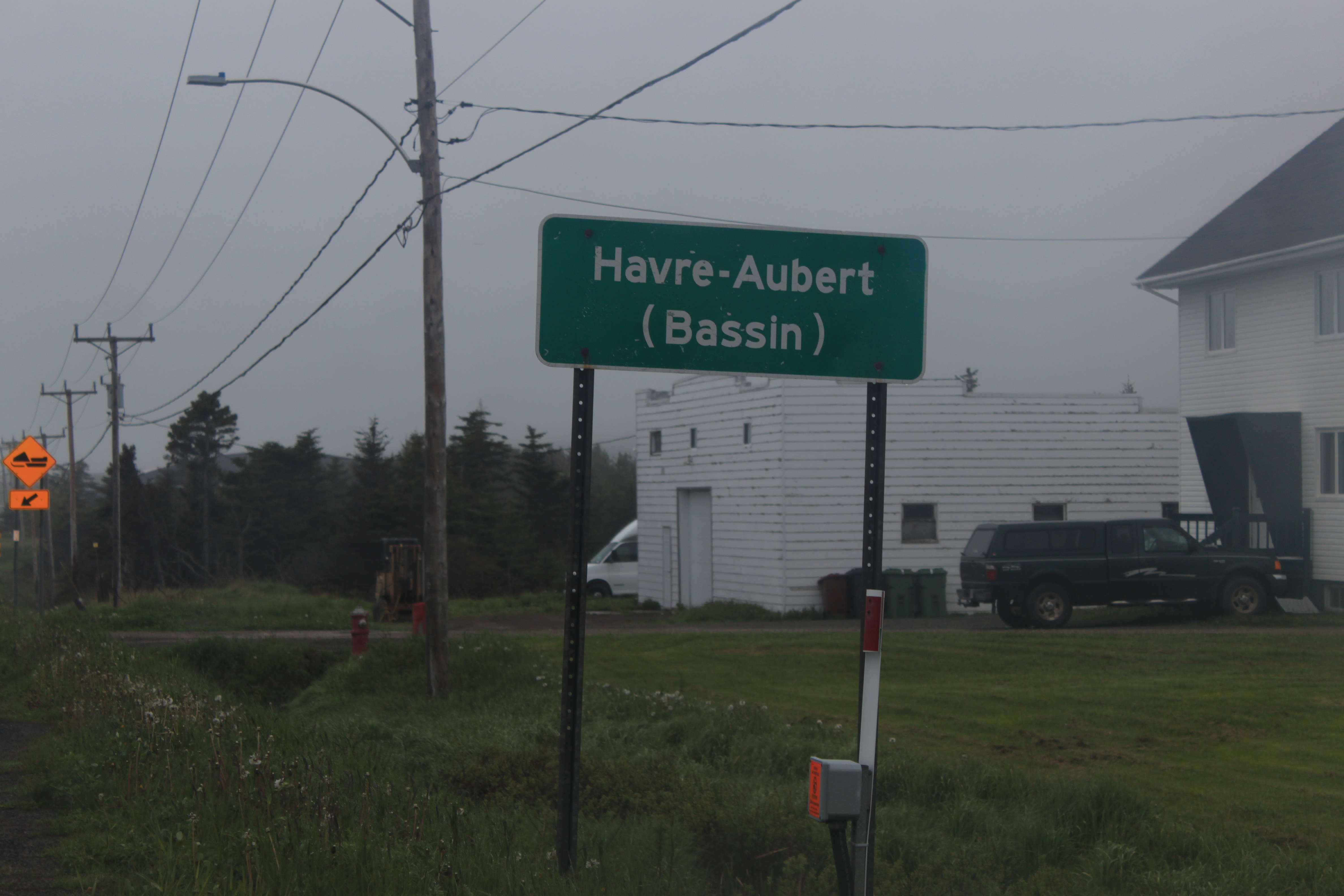 Panneau aperçu en arrivant à (Bassin) aux Îles-de-la-Madeleine